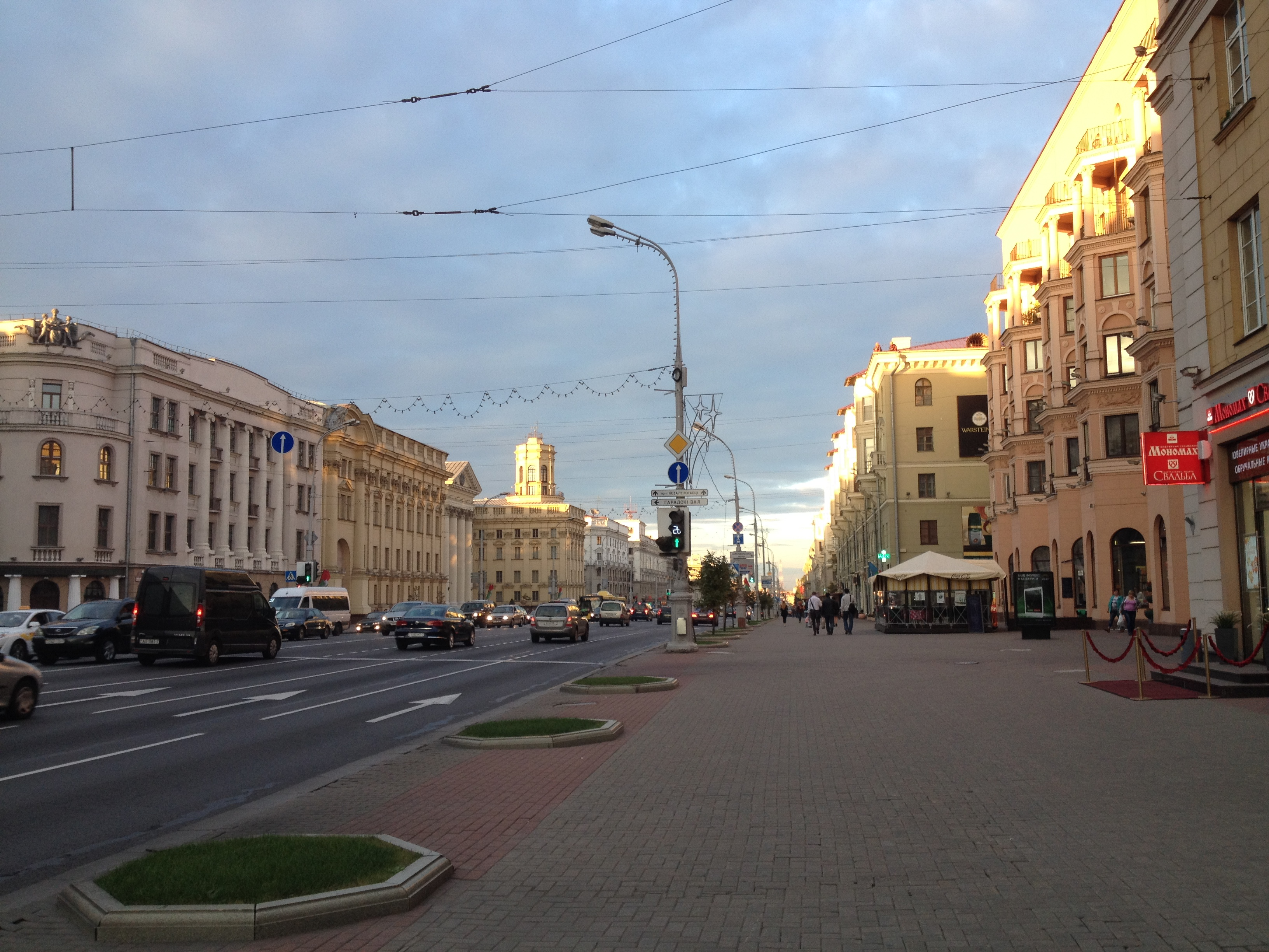 Prospekt Niezależności w Mińsku